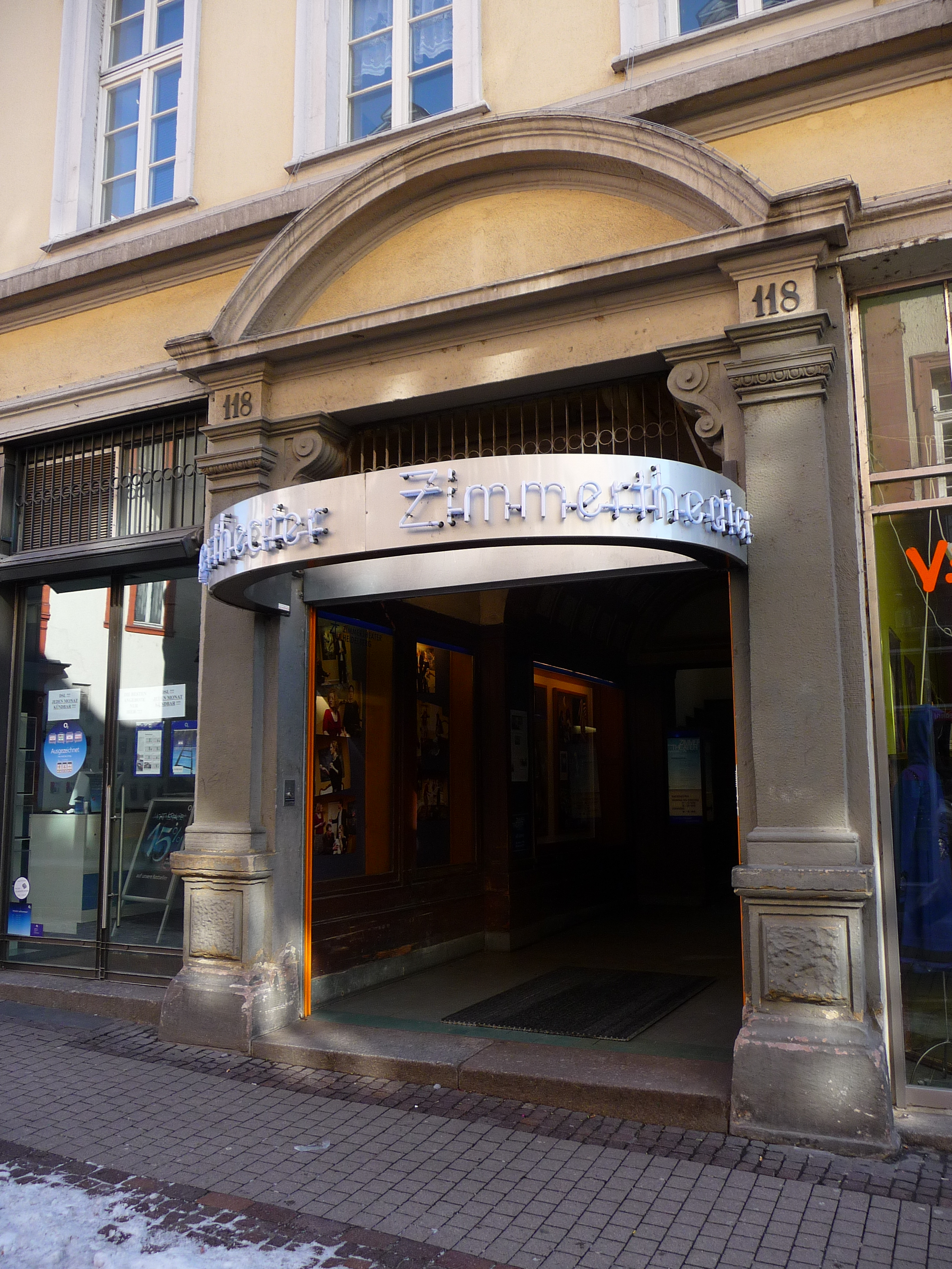 Eingang zum Zimmertheater in der Hauptstraße 118 in Heidelberg (Baden-Württemberg, Deutschland)